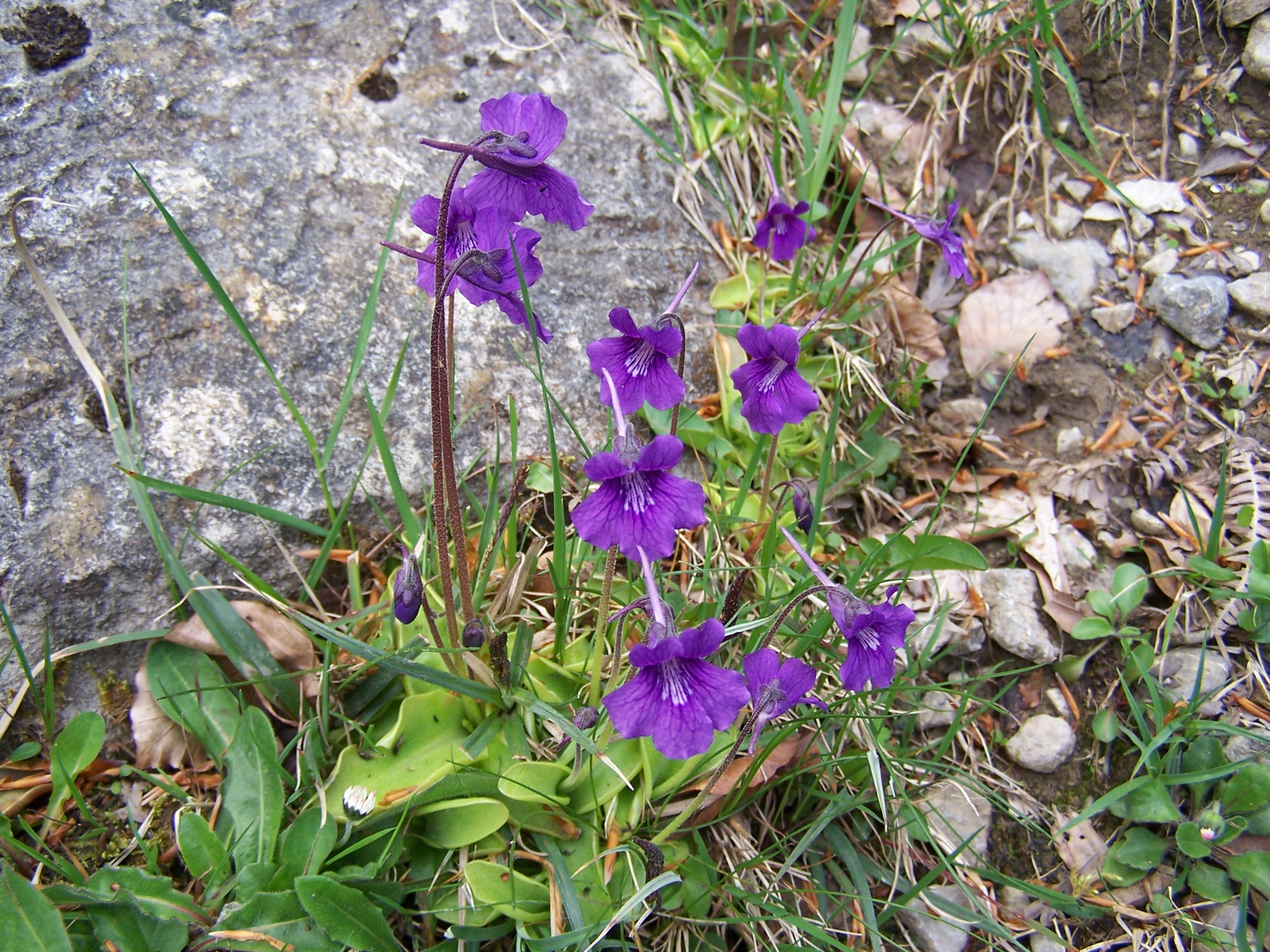 Picos de Europa This is a photography of a Special Area of Conservation in Spain with the ID: ES1200001. Natura2000 entry, EEA entry